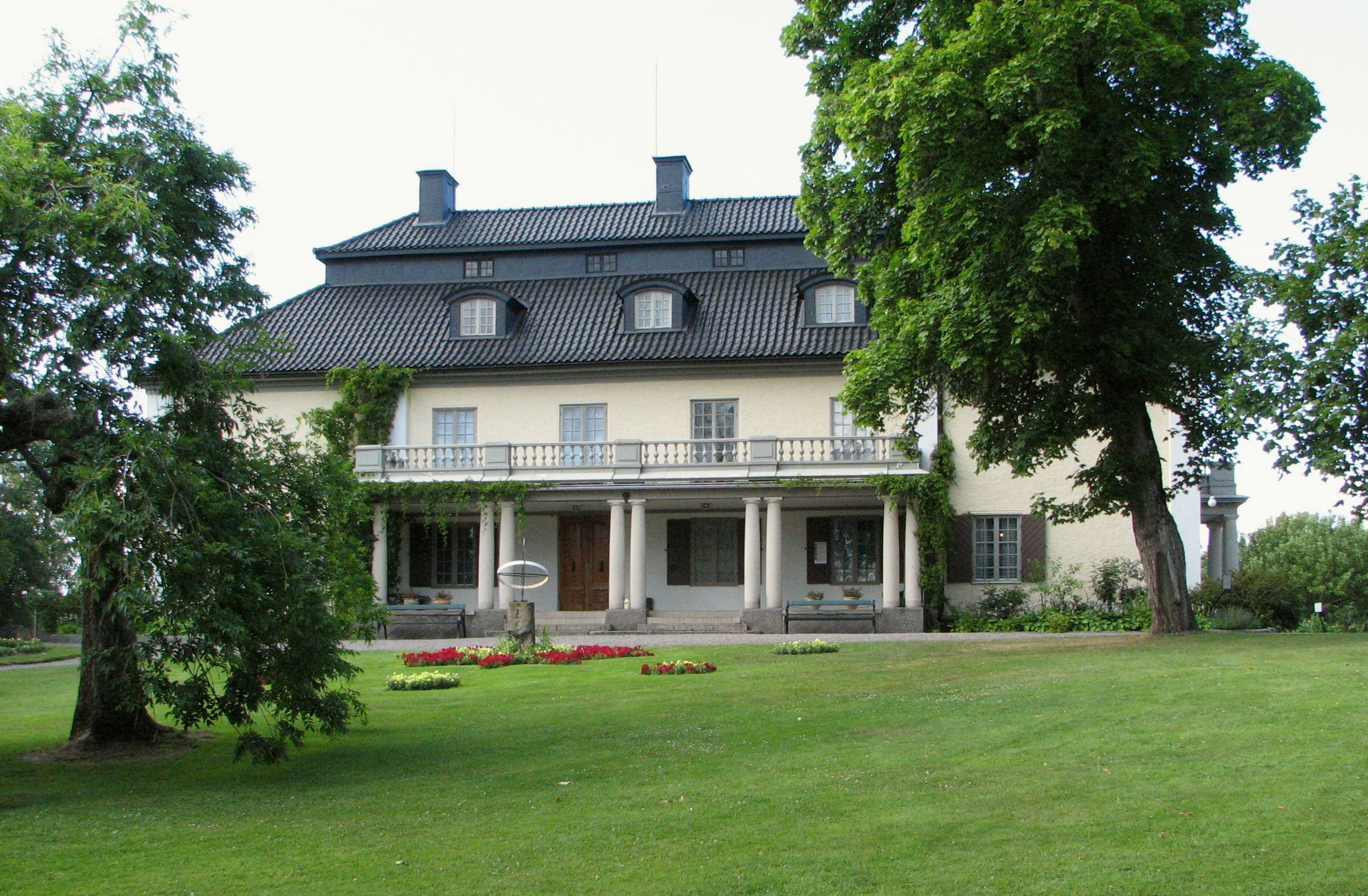 Selma Lagerlöfs Mårbacka at Sunne in Värmland, Sweden